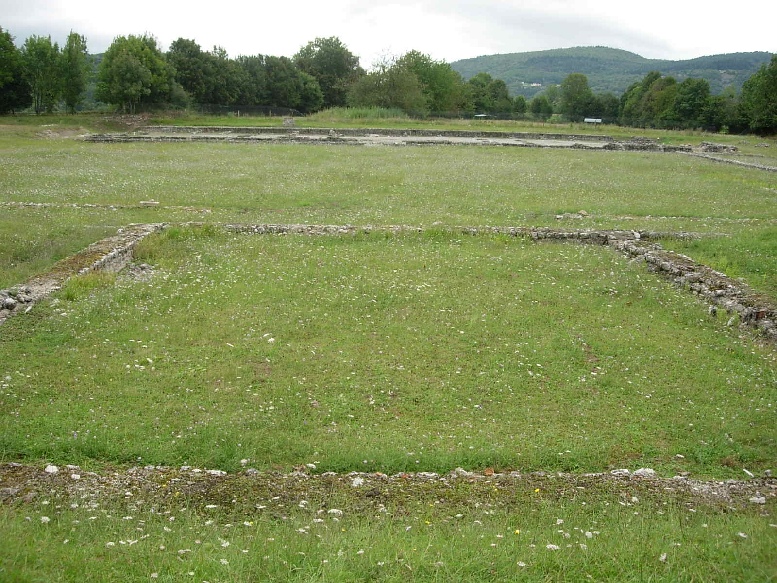 Lugar donde se encontraba el templo dedicado a Andossus del Siglo II, en el yacimiento de la Villa romana de Lugdunum Conuenae.